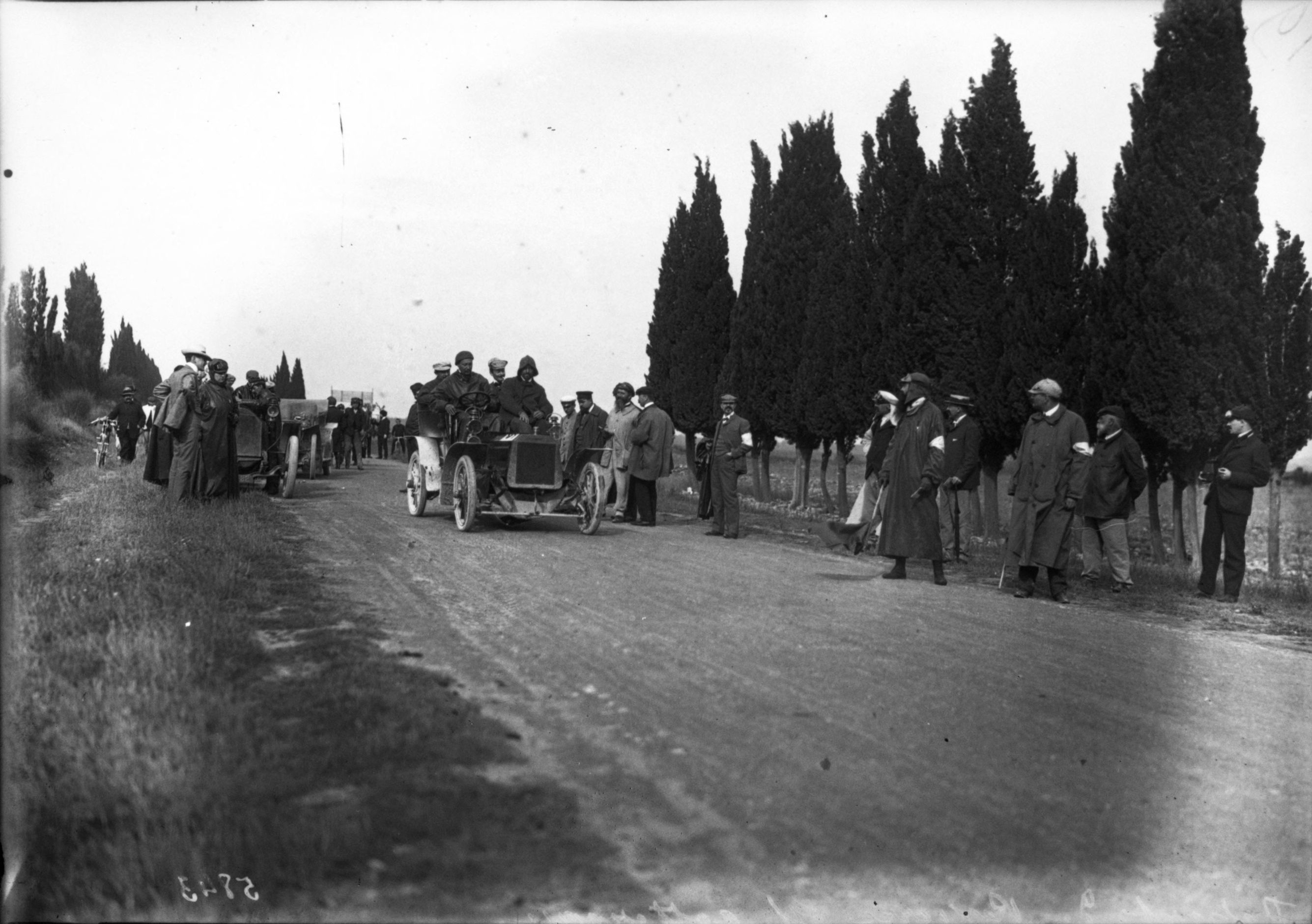 Mr Rivierre sur une voiture Cottereau, lors d'une course sur le Mont Ventoux, en 1906